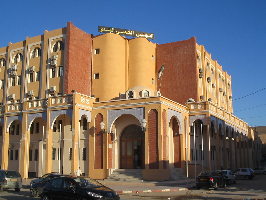 APC de Biskra